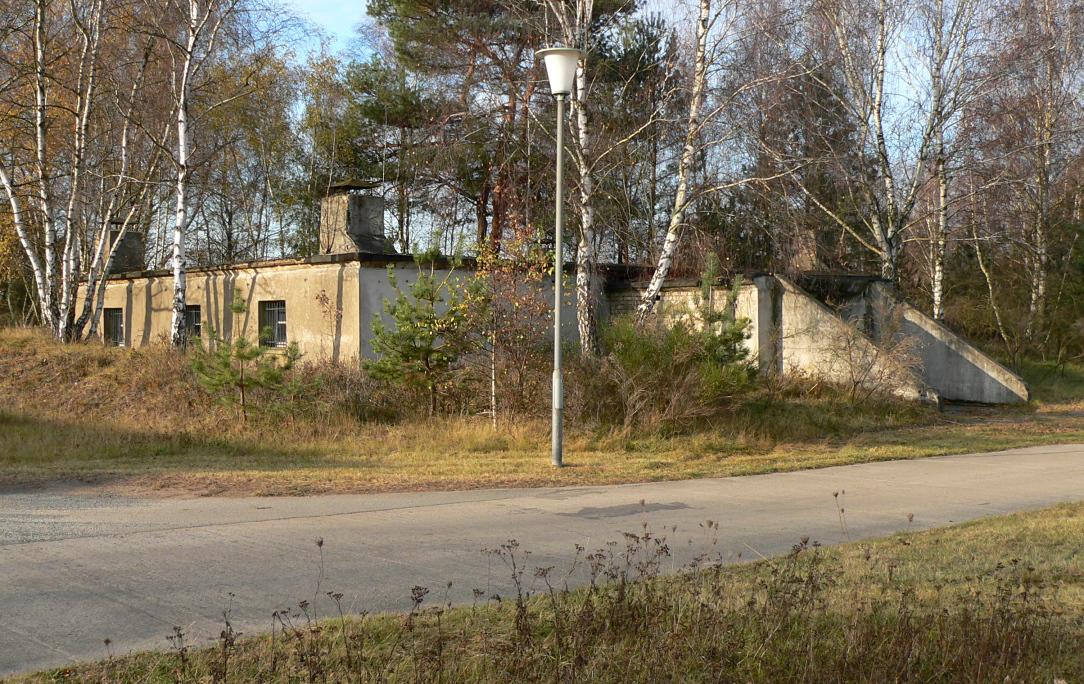 Ehemaliger Munitionsbunker in Camp Reinsehlen